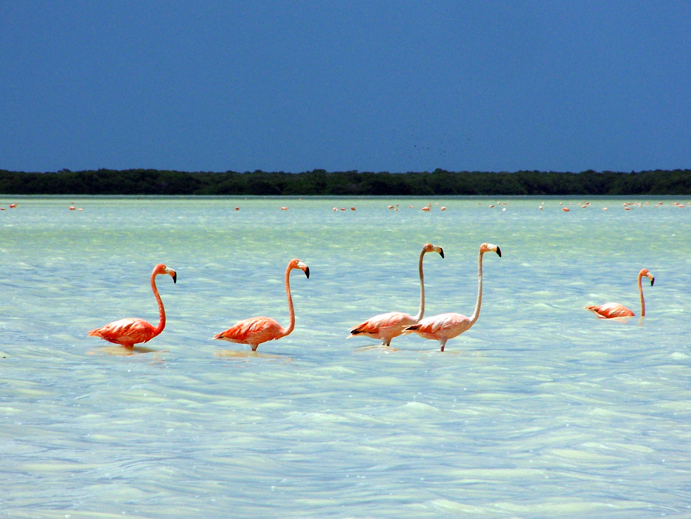 Flamencos en la reserva de la biósfera de Celestún, Yucatán